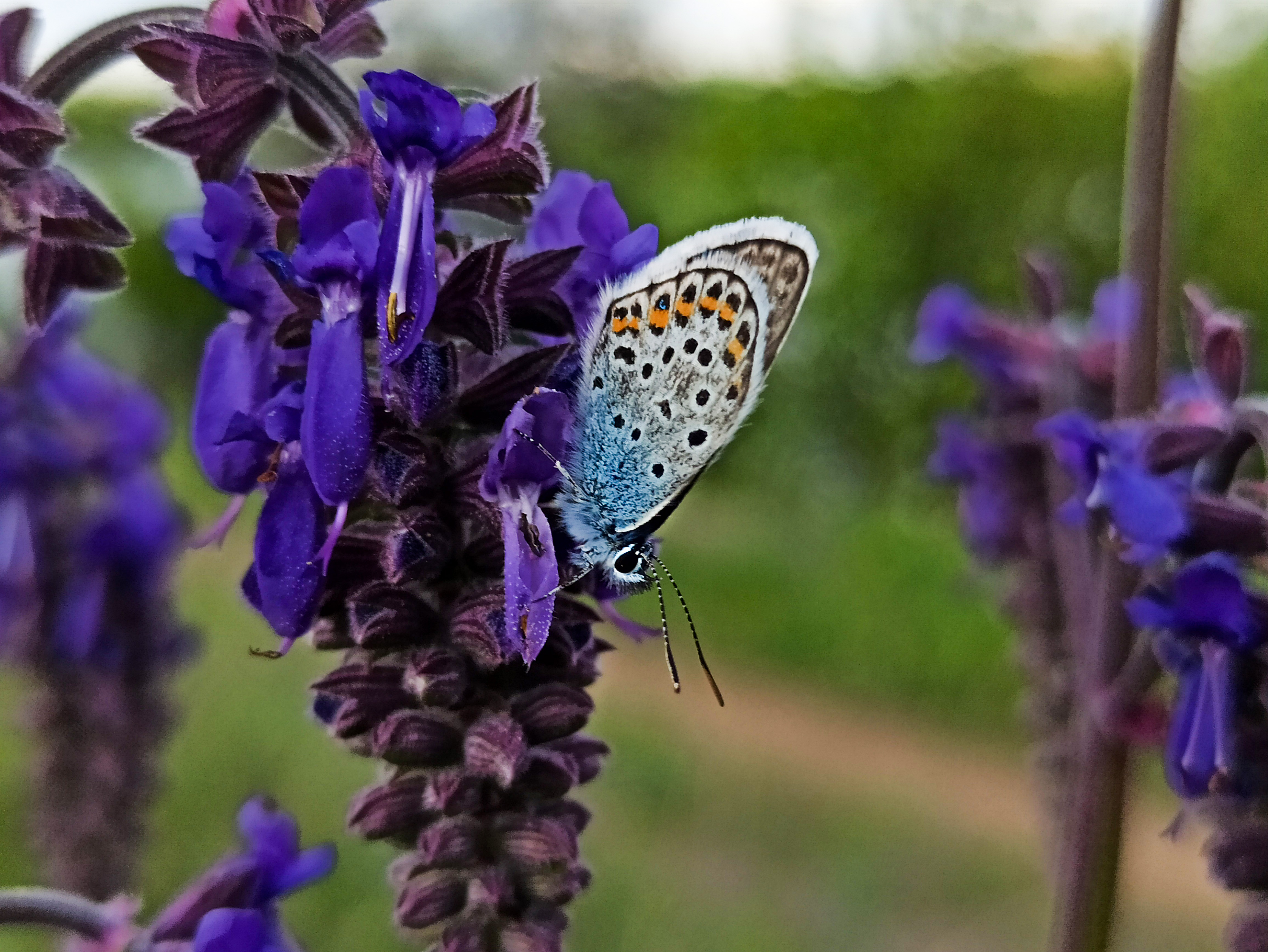 Голубянка икар в процессе кормления